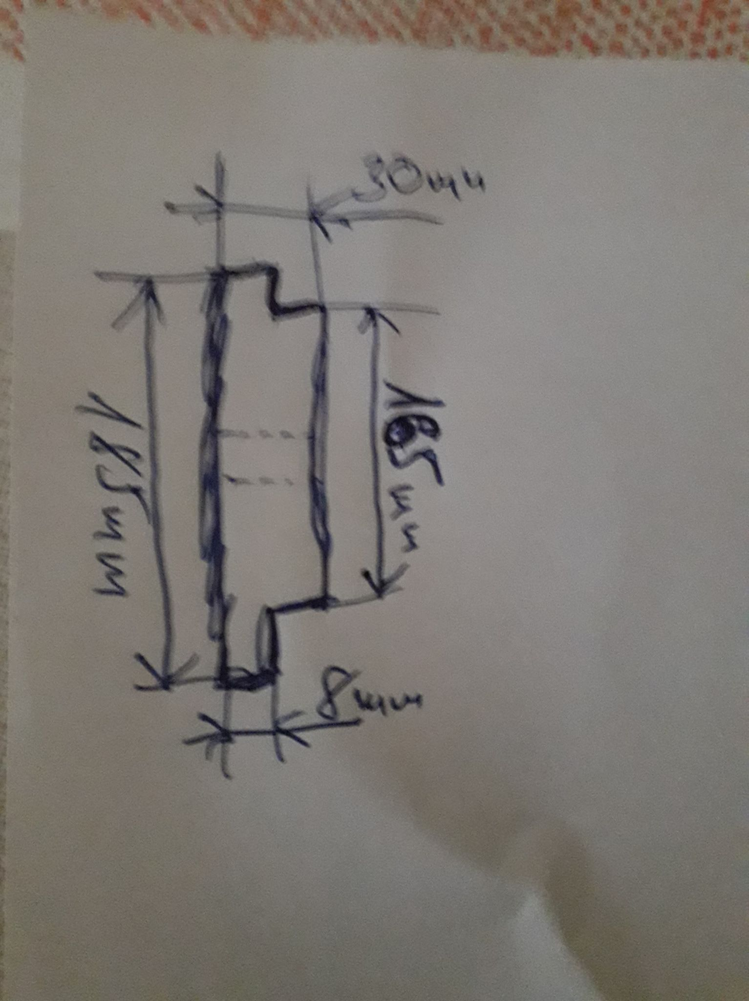 A Gödöllői Kerti Vasút 2021-re feltehetően elkészülő mozdony kerekének tervrajza